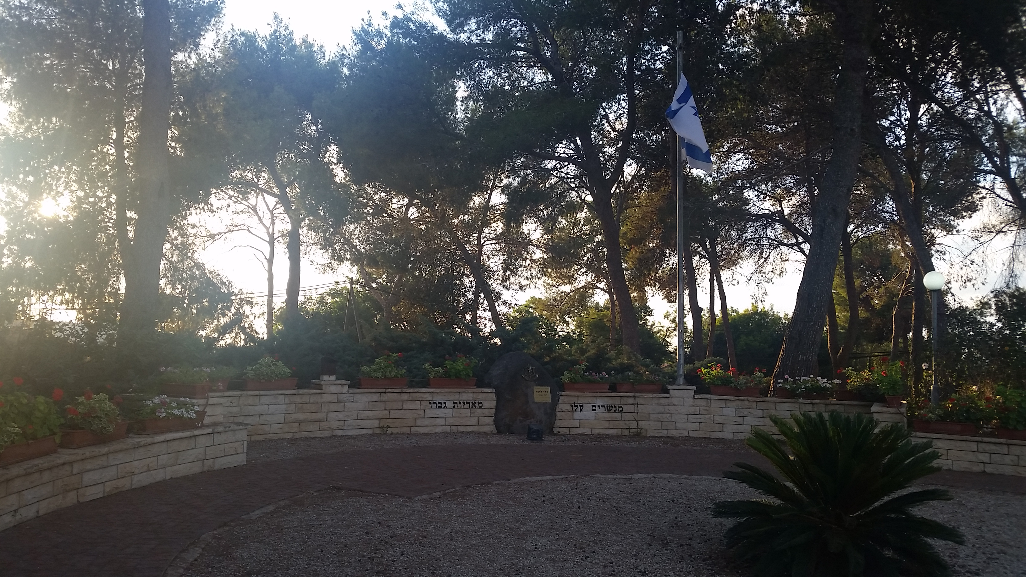 האנדרטה לזכר אלי לופו בחניאל